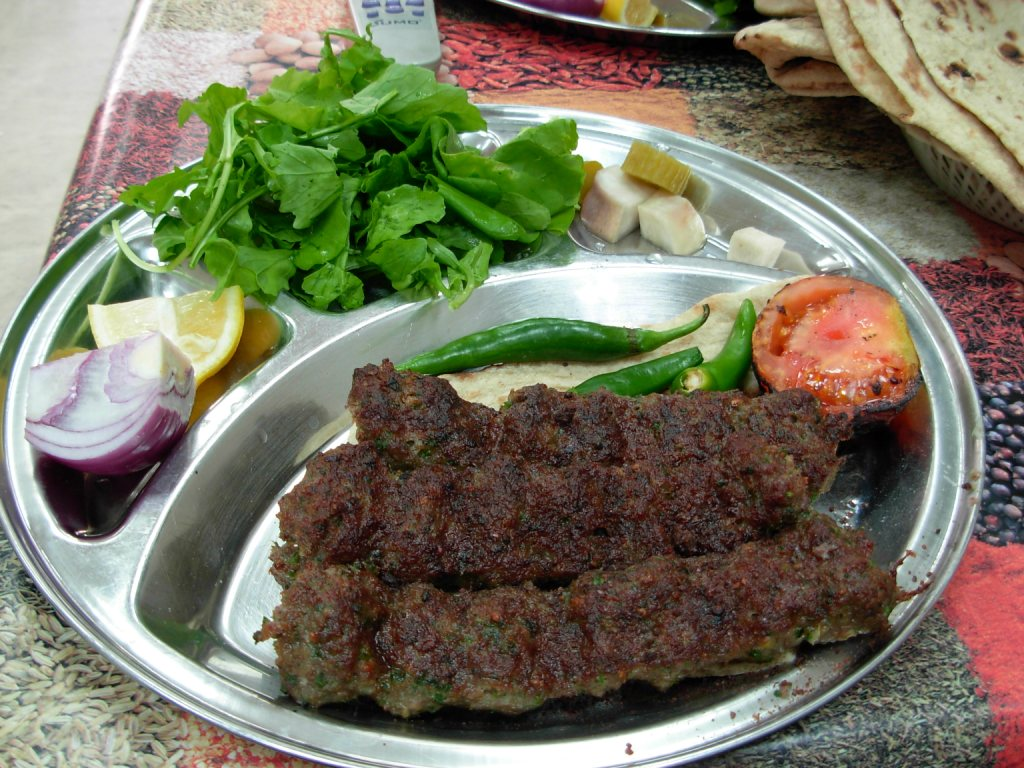 കുവൈറ്റിലെ ഒരു അറബ് ഭക്ഷണശാലയിൽ കബാബ് തയാറാക്കിയിരിക്കുന്നു.